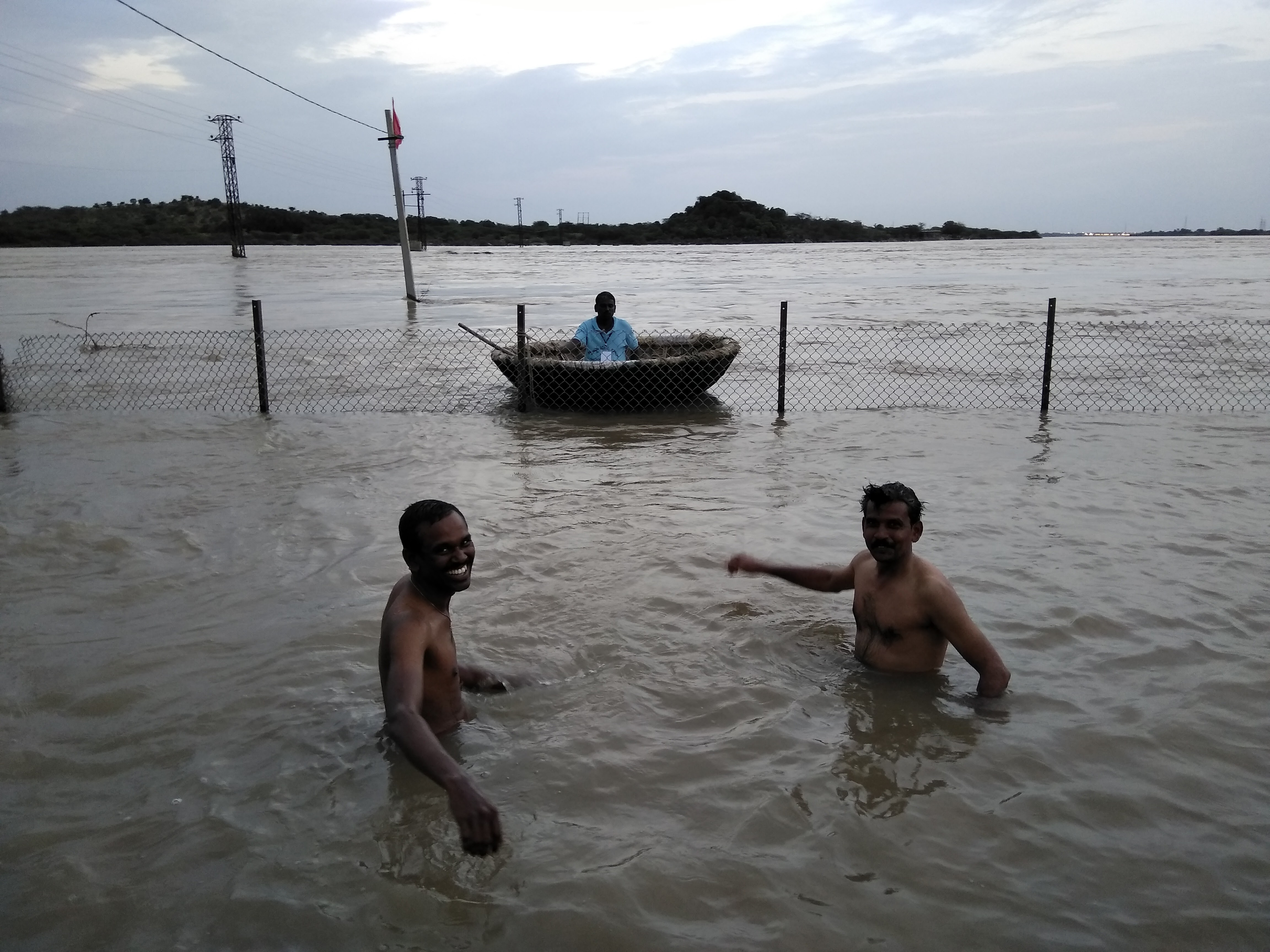 బీరోలు పుష్కర స్నానఘట్టం